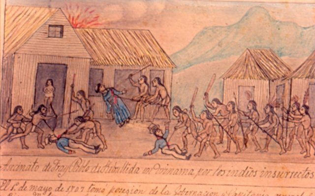 Pablo Presbere ataca el pueblo de San Bartolomé de Urinama, donde da muerte al fraile Pablo de Rebullida y dos soldados españoles. Álbum de Figueroa (siglo XIX).